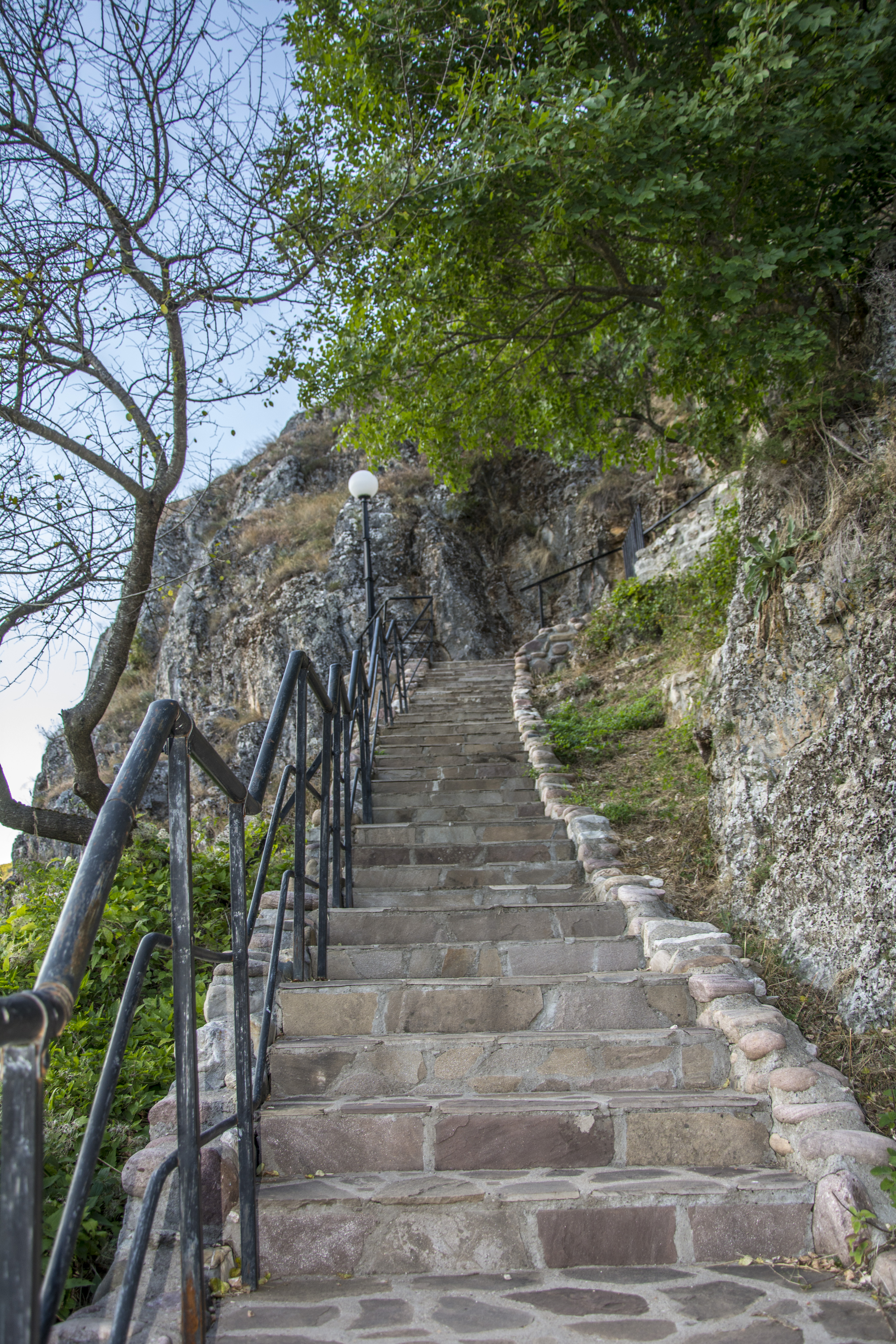 Пут ка цркви, Рсовци